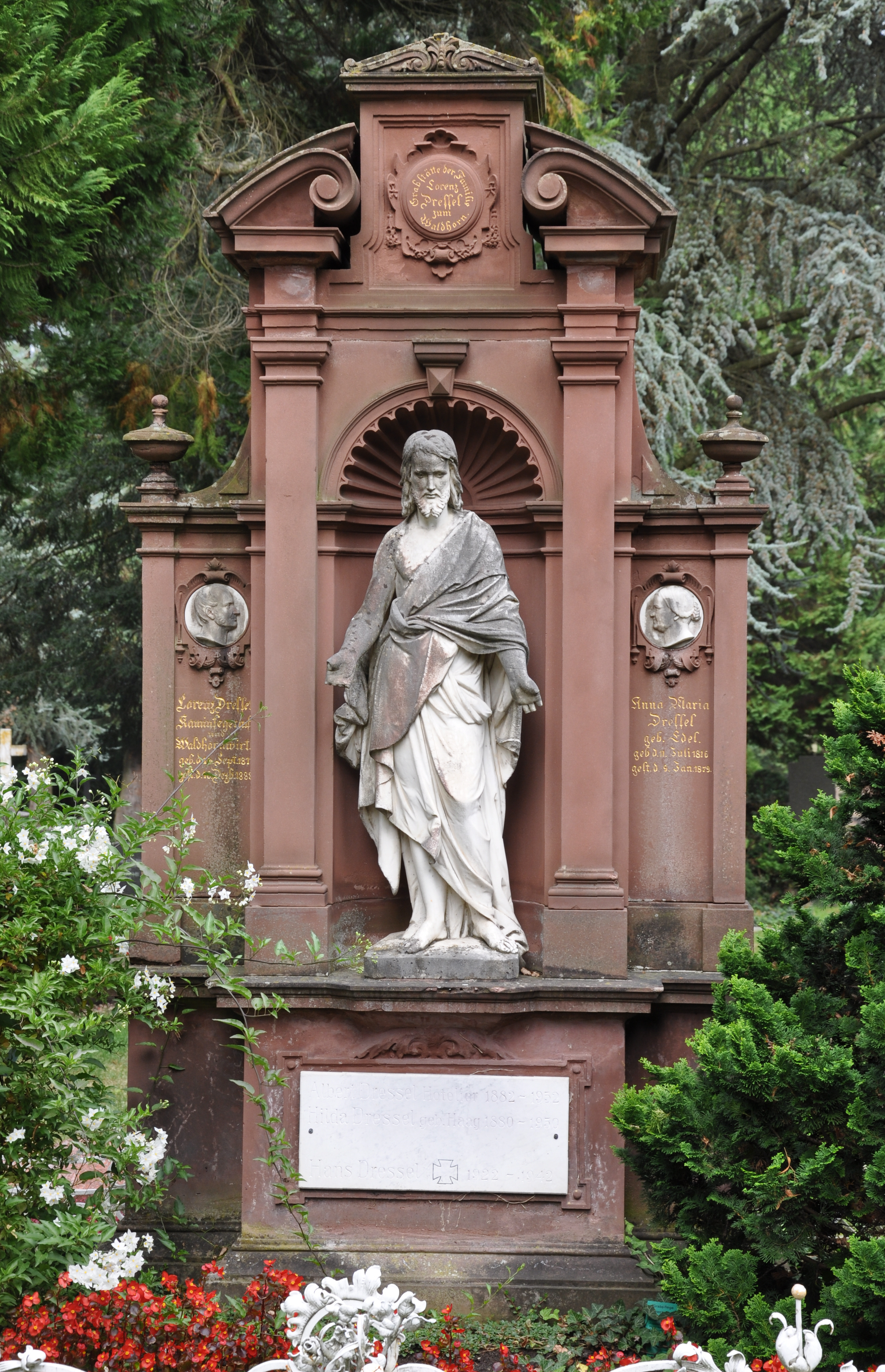 Ravensburg, Hauptfriedhof, Grabmal Familie Dressel mit Christus-Skulptur von Josef Dressel